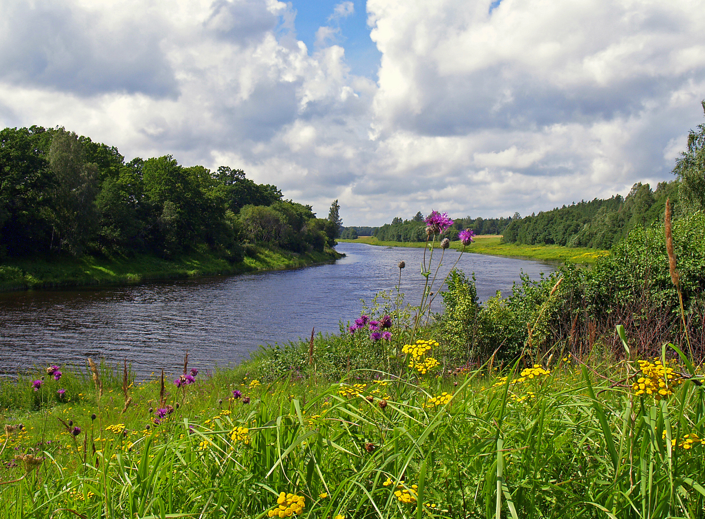 Venta pie Piltenes (Venta near Piltene)